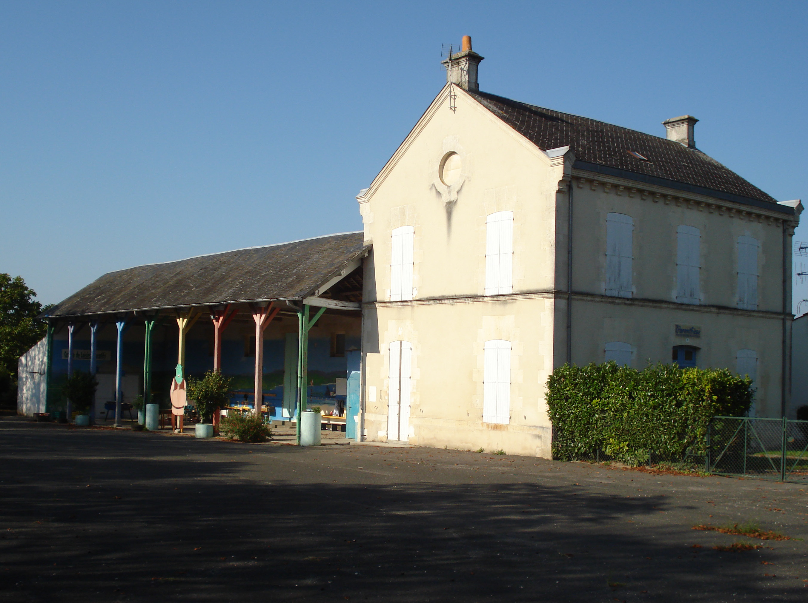 L'ancienne école desgarçon d'Aulnay